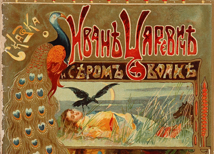 Жуковский В. А. «Сказка о Иван-Царевиче и Сером волке». — М.: Издание Товарищества И.Д. Сытина, 1902. Фрагмент